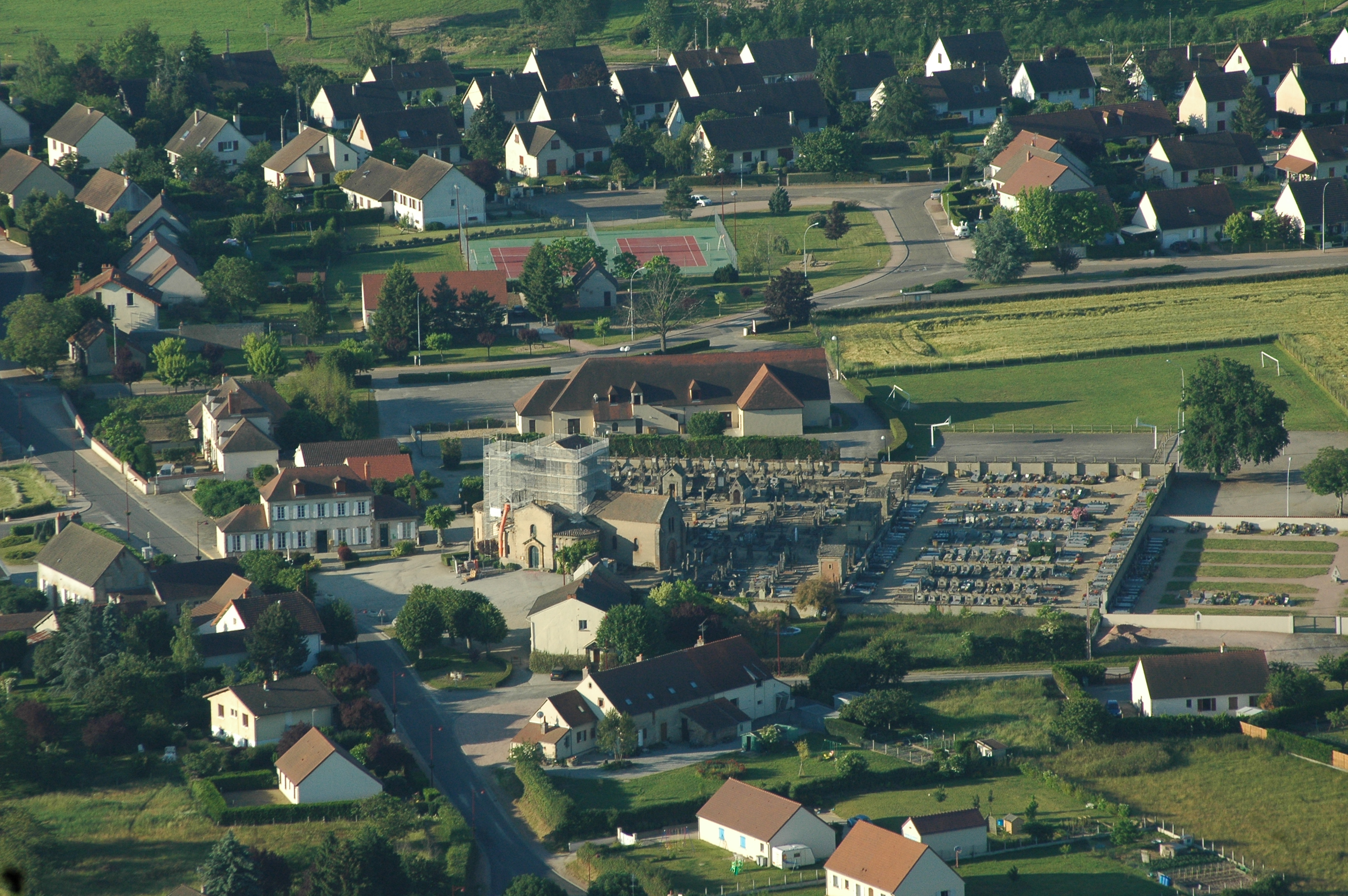 Vue aérienne de Neuvy, Allier, France.